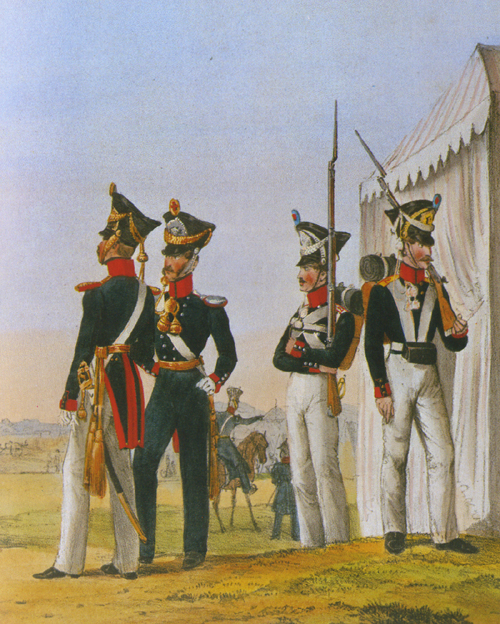 Oldenburgische Infanterie um 1830 - 1. Regiment silber, 2. Regiment Goldbeschläge